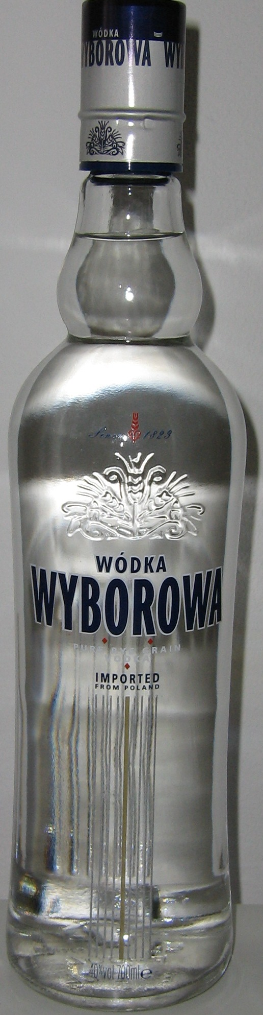 polnischer Vodka (WYBOROWA WÓDKA)